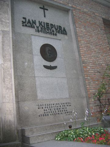 Jan Kiepura's monument (Powązki Cemetery)